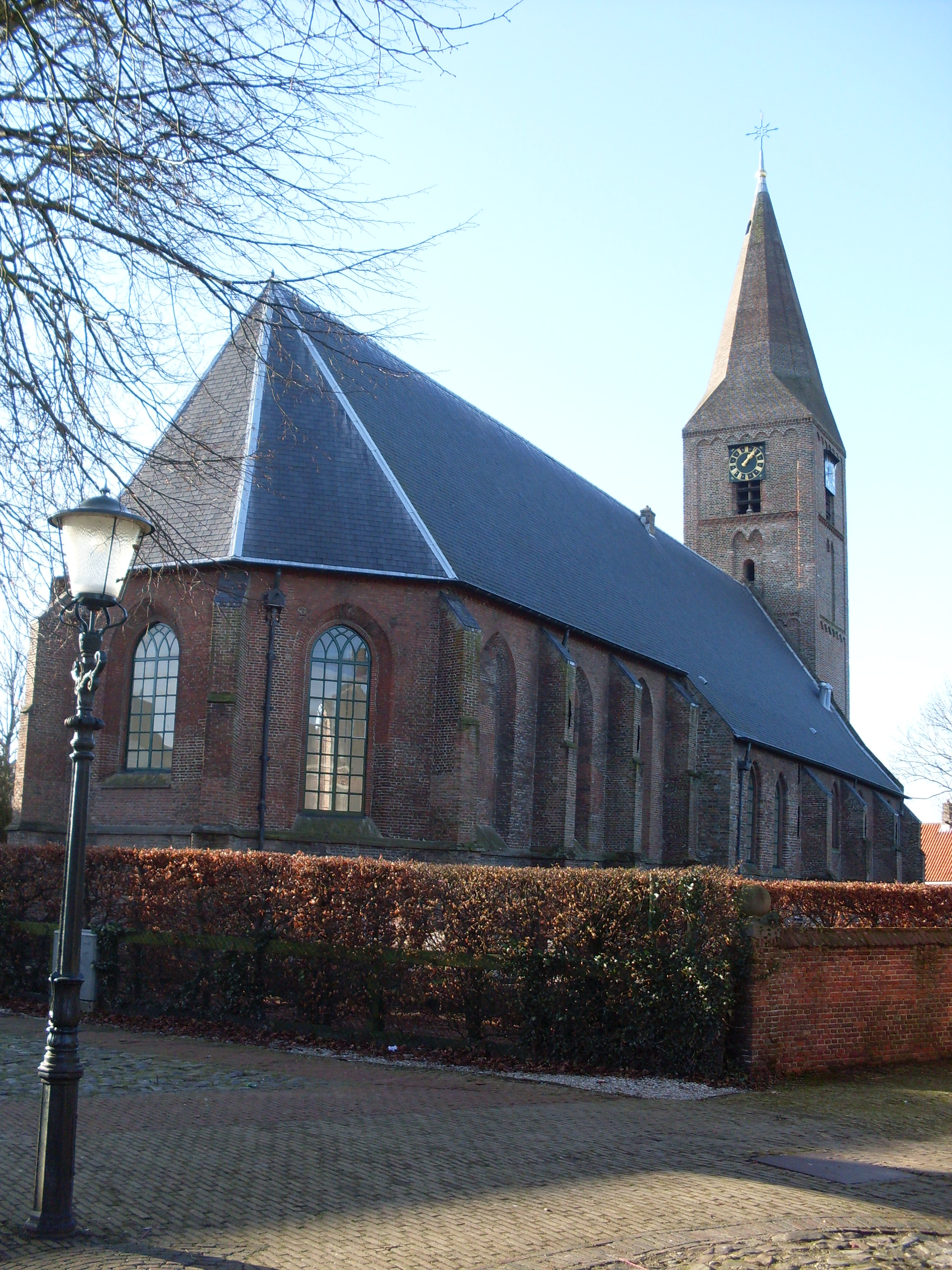 Ned. Herv. kerk, Kerkbuurt 1, Uitgeest.